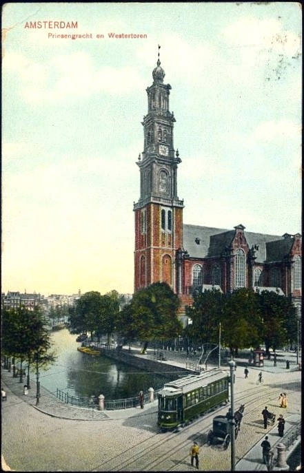 Old postcard of Amsterdam. Groene motorwagen ('Kikker') van de tramlijn Amsterdam - Haarlem - Zandvoort.